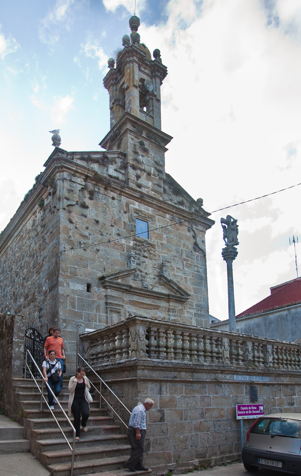 Capela da Nosa Señora do Bo Suceso, Fisterra